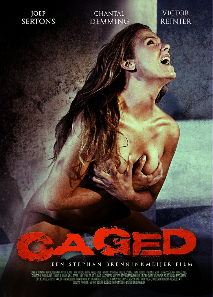 Officiële filmposter Caged (2011)